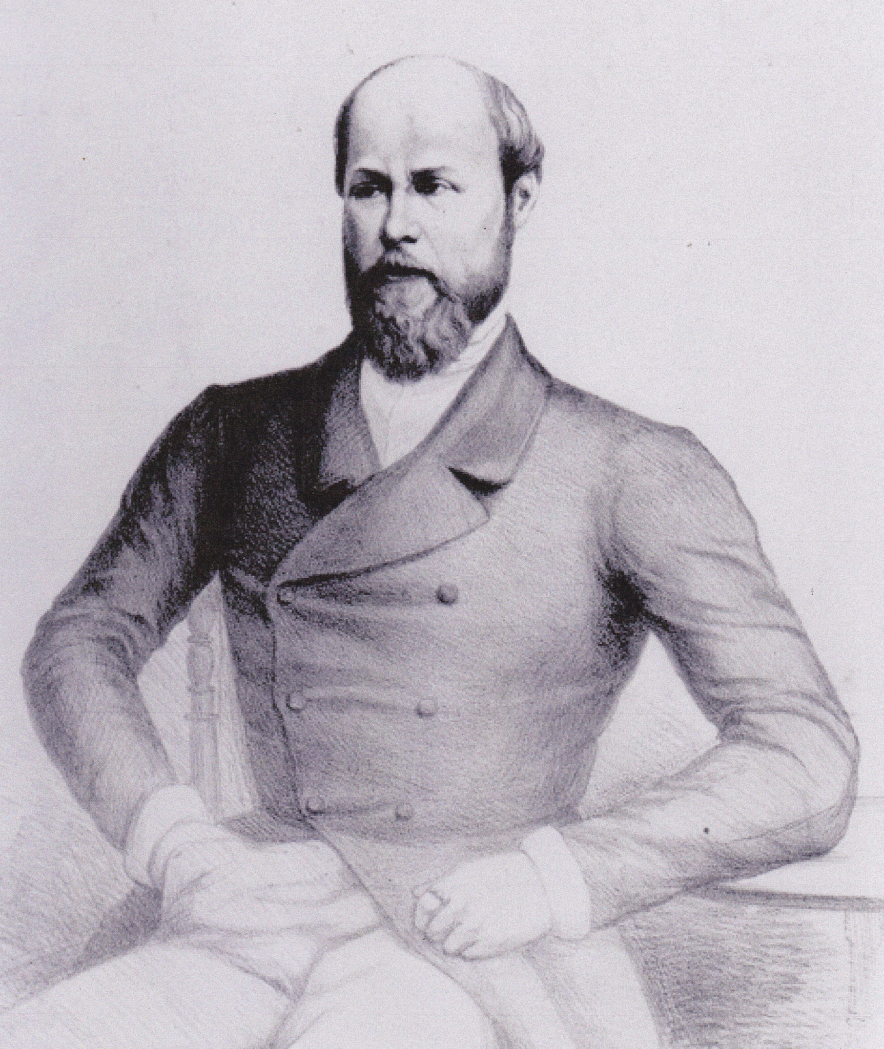 né en 1813 - mort en 1894. Ancien député maire d'Avignon